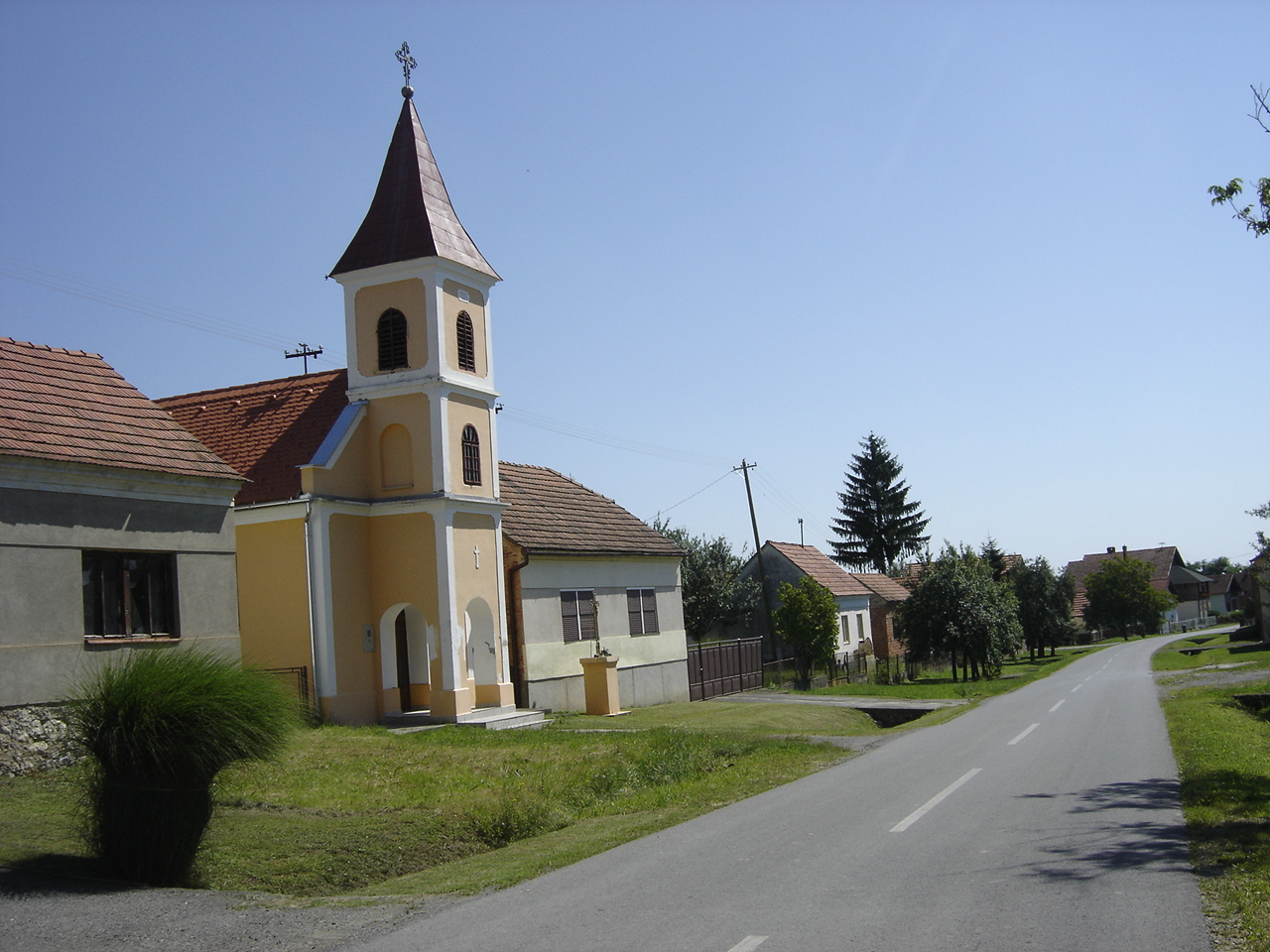 Nova Jošava, crkva svete Terezije